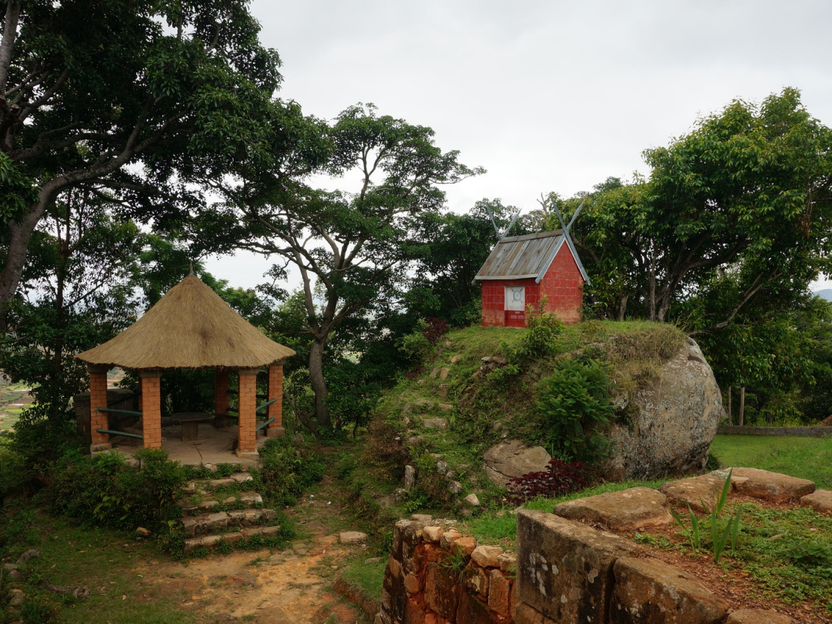 Malagasy: Tranomasin' Andriamangarira